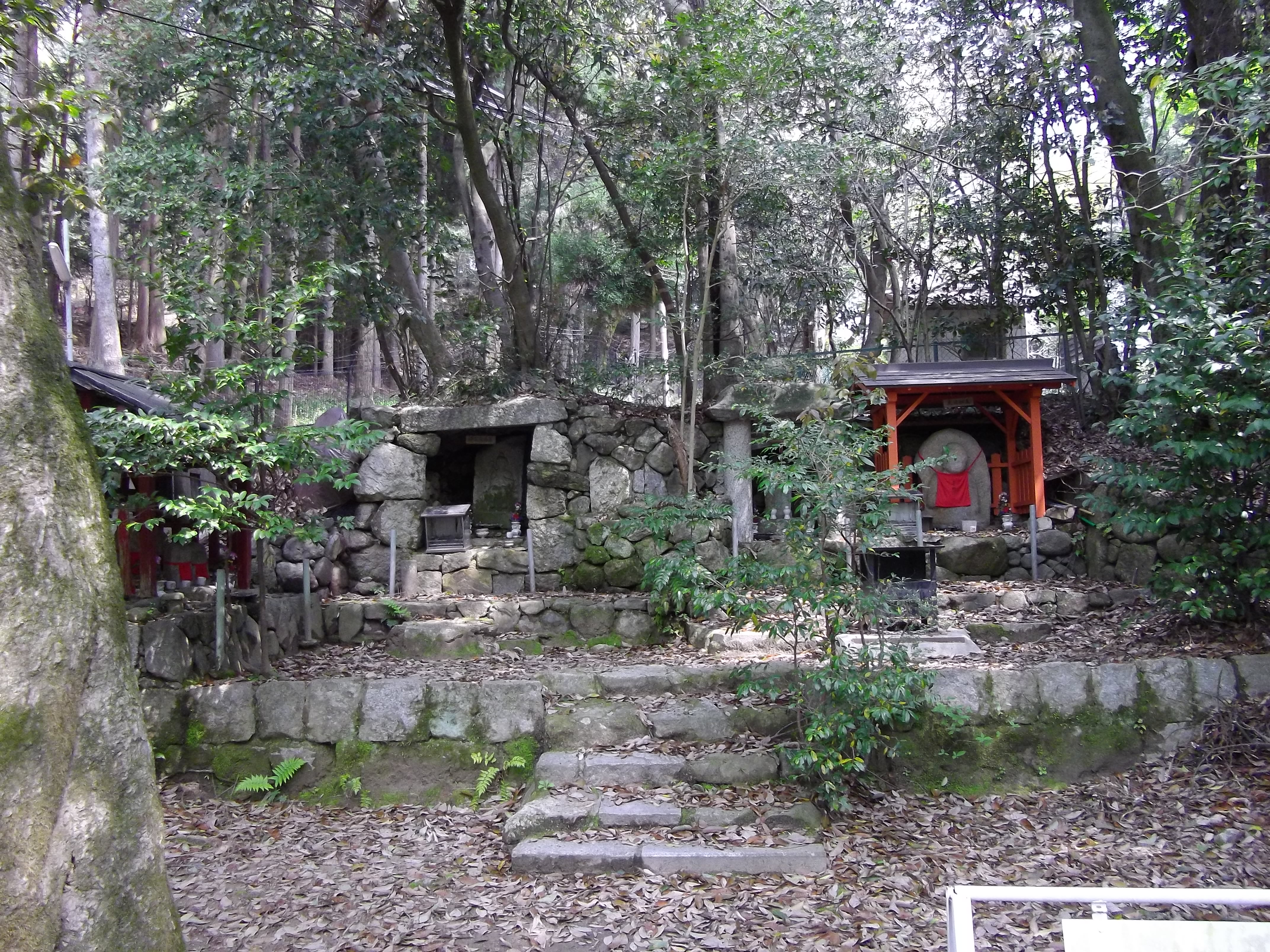 大文字山銀閣寺北登山口 行者の森石碑近辺